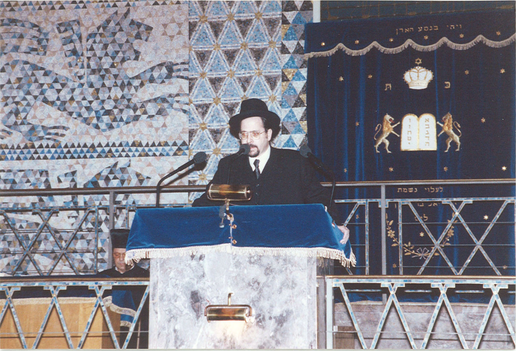 Fünfzigster Kristallnacht Gedenkstunde in die Frankfurter West-End Synagoge